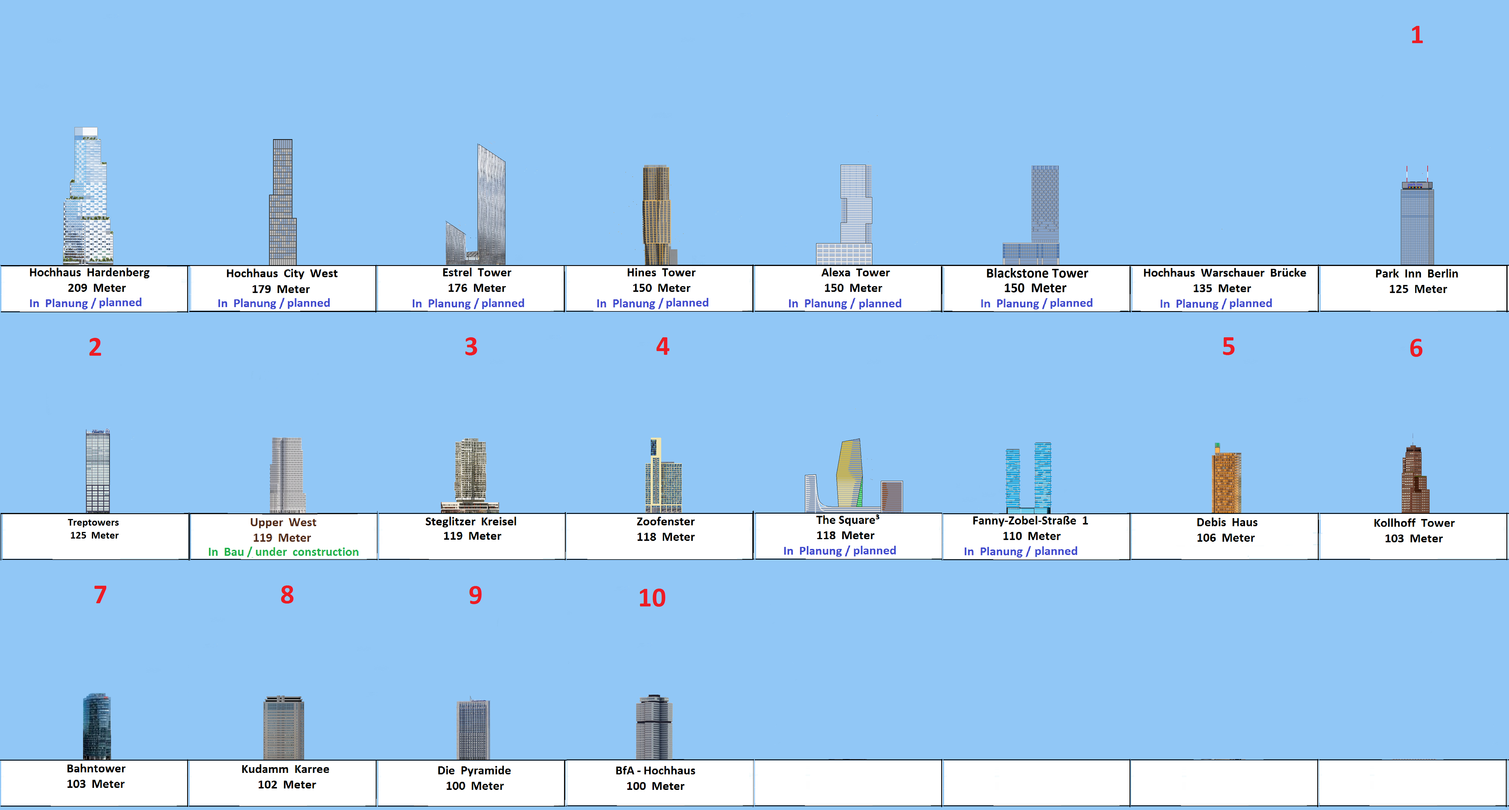 Diagramm aller Hochhäuser in Berlin ab 100 Meter (fertiggestellt, in Bau, in Planung)